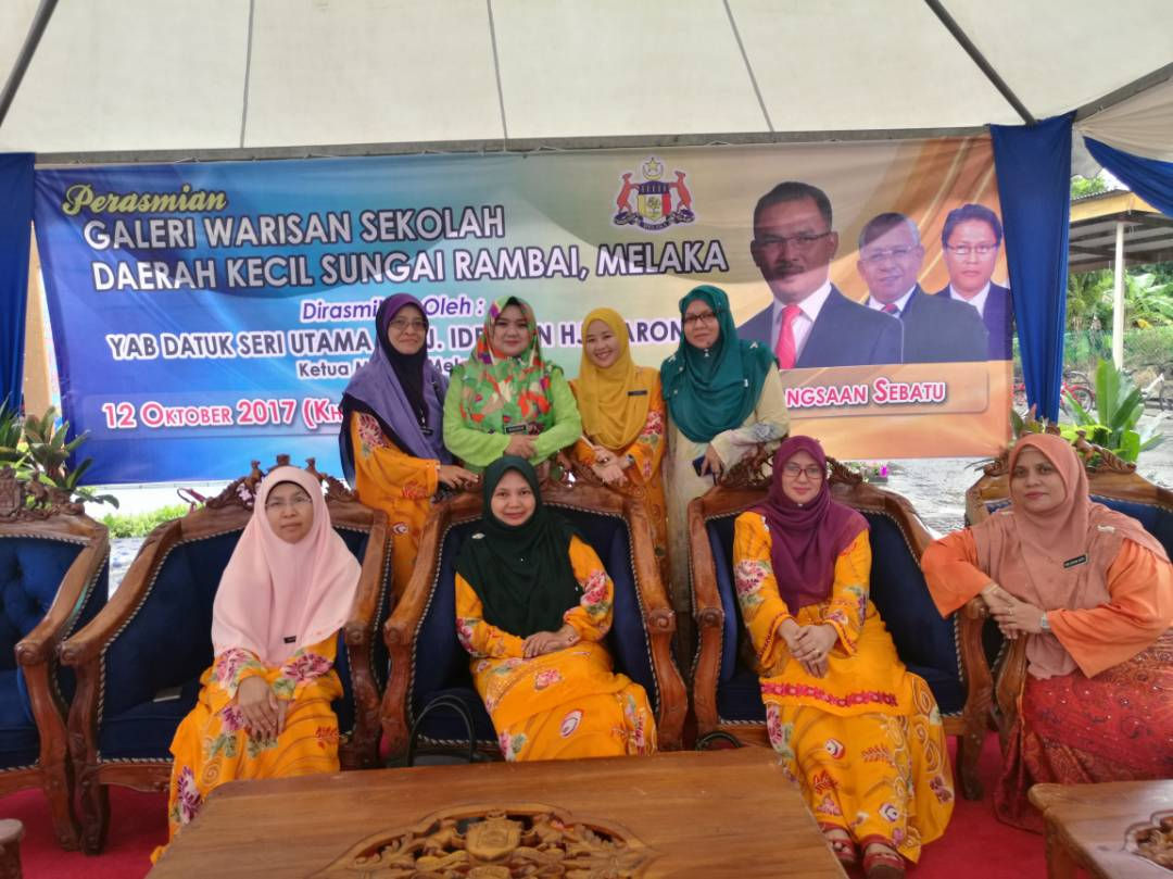 Kesian, Ibu-ibu penat melayan tetamu